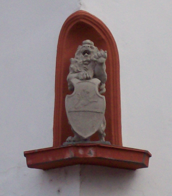 Löwenskulptur mit Wappen am Vorderhaus des ehemaligen Eltzer Hofs in Boppard